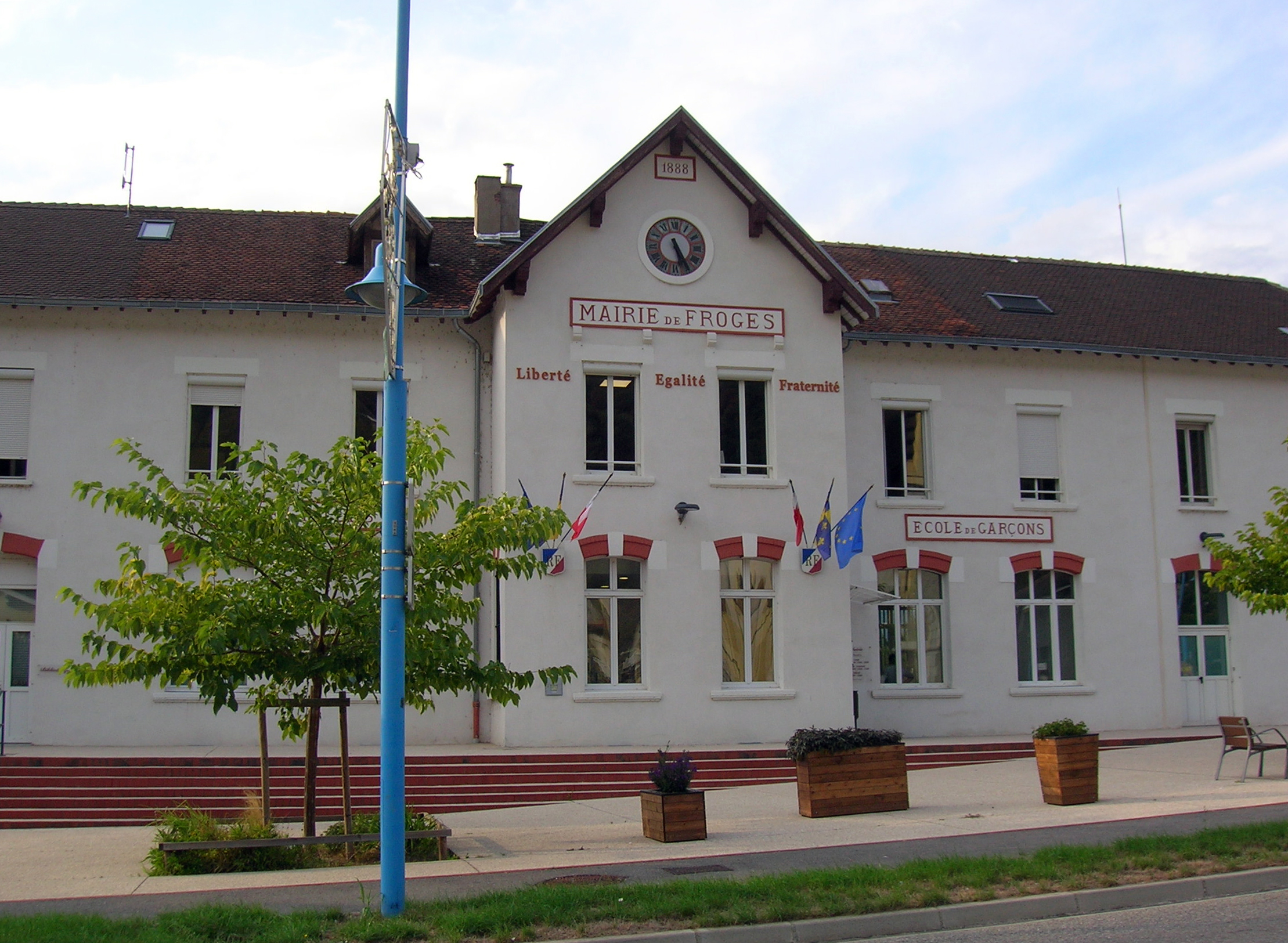 mairie de Froges, Isère, AuRA, France.